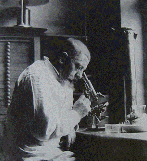 French neurologist Jules Dejerine (1849-1917)